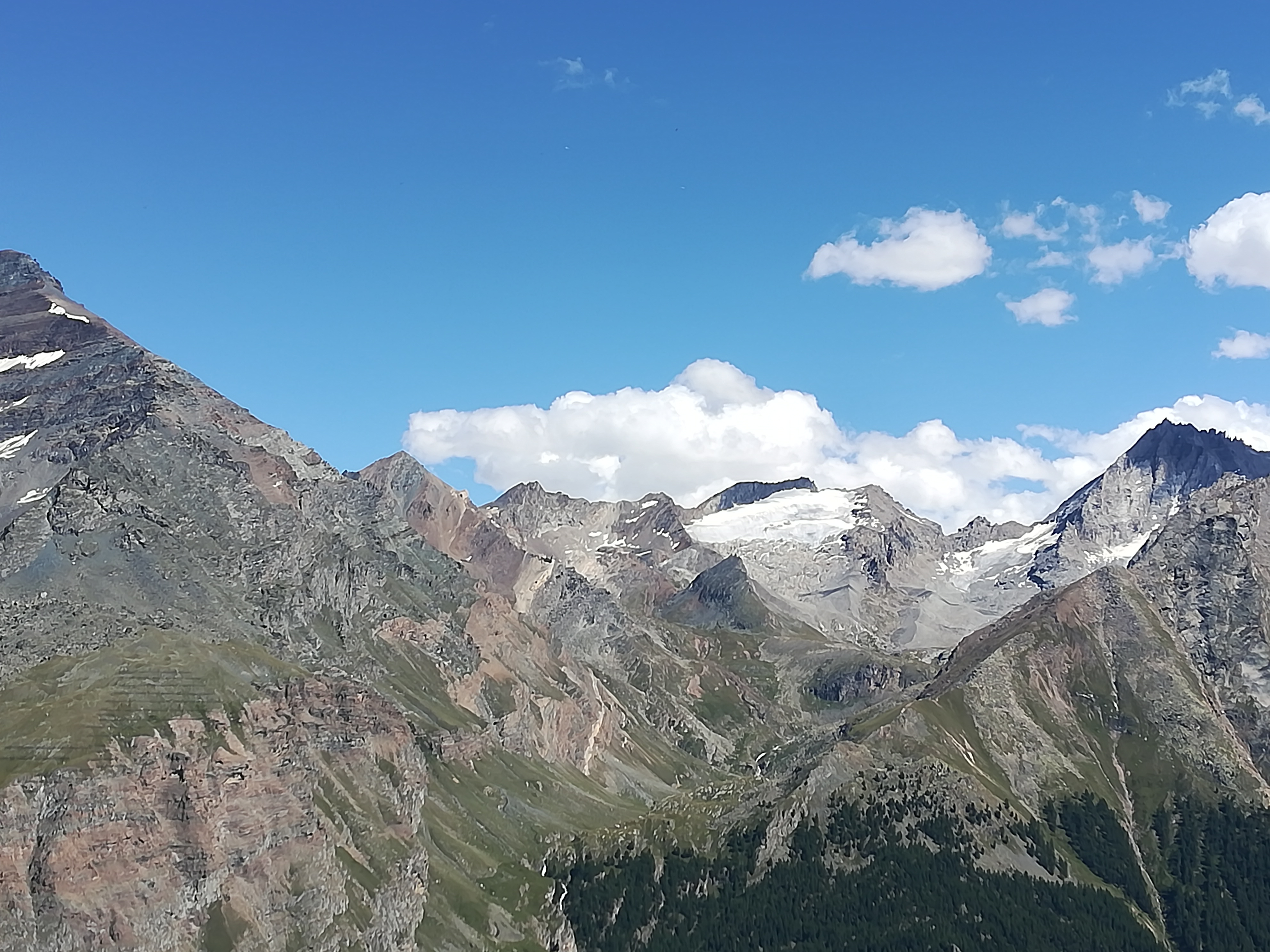 Al centro la Gran Serra con il ghiacciaio del Timorion vista dal versante verso la Valsavarenche. A destra l'Herbétet. A destra l'Herbétet.